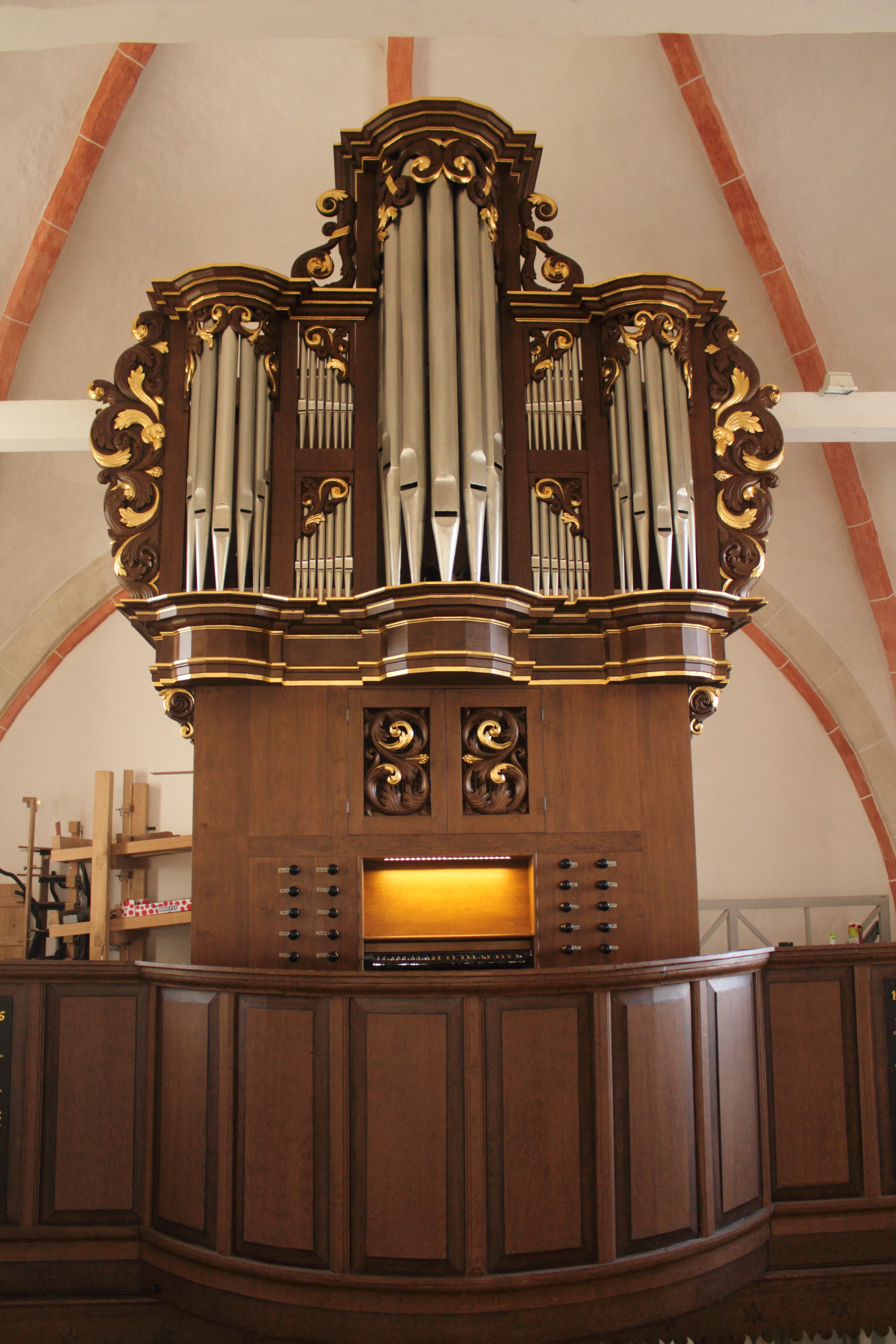 Das erste Bild nach Einbau der Prospektpfeifen